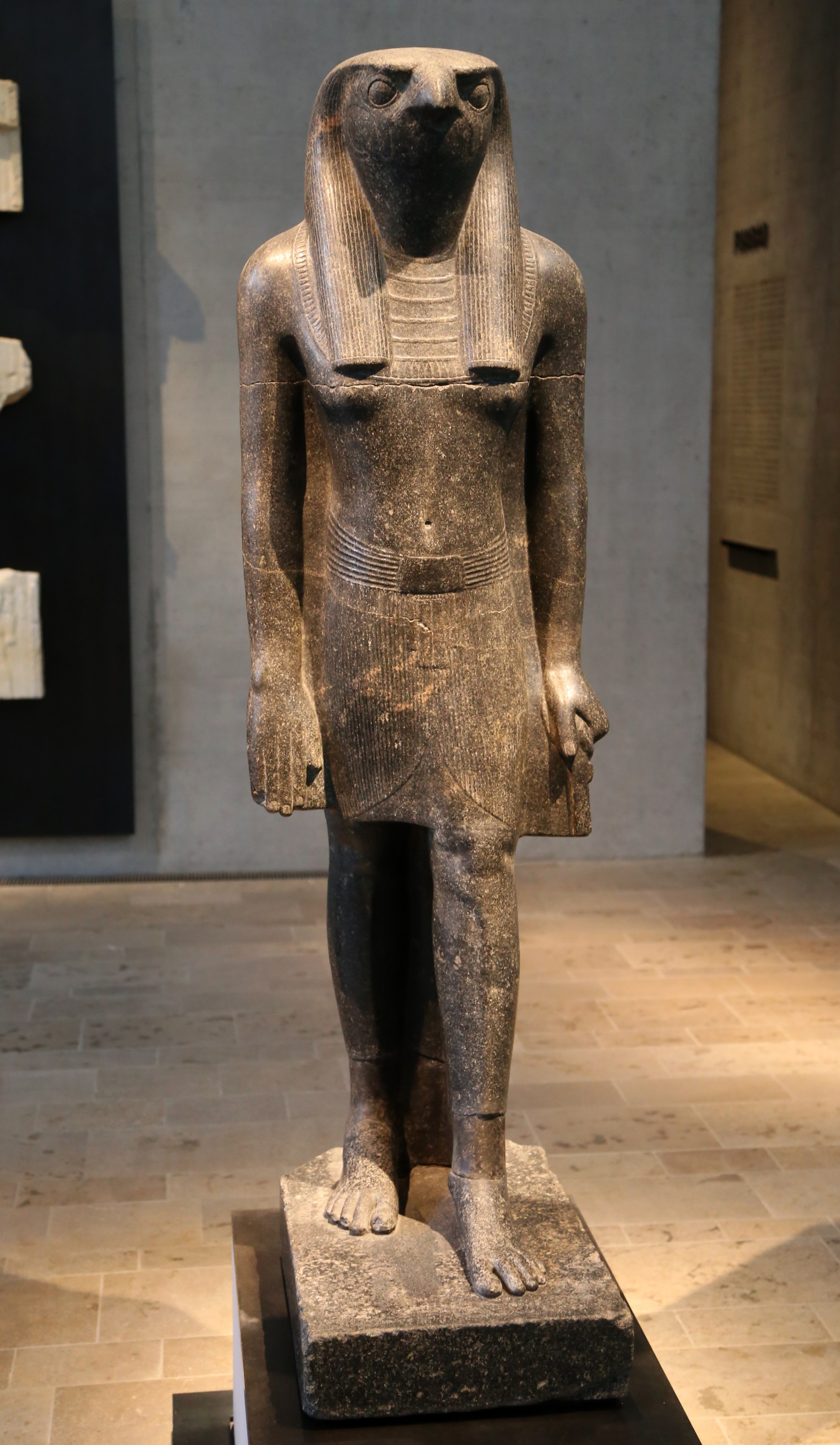 Stand-Schreitfigur des Gottes Horus, Theben-West, Totentempel Amenopys III., um 1360 v. Chr., Granodiorit